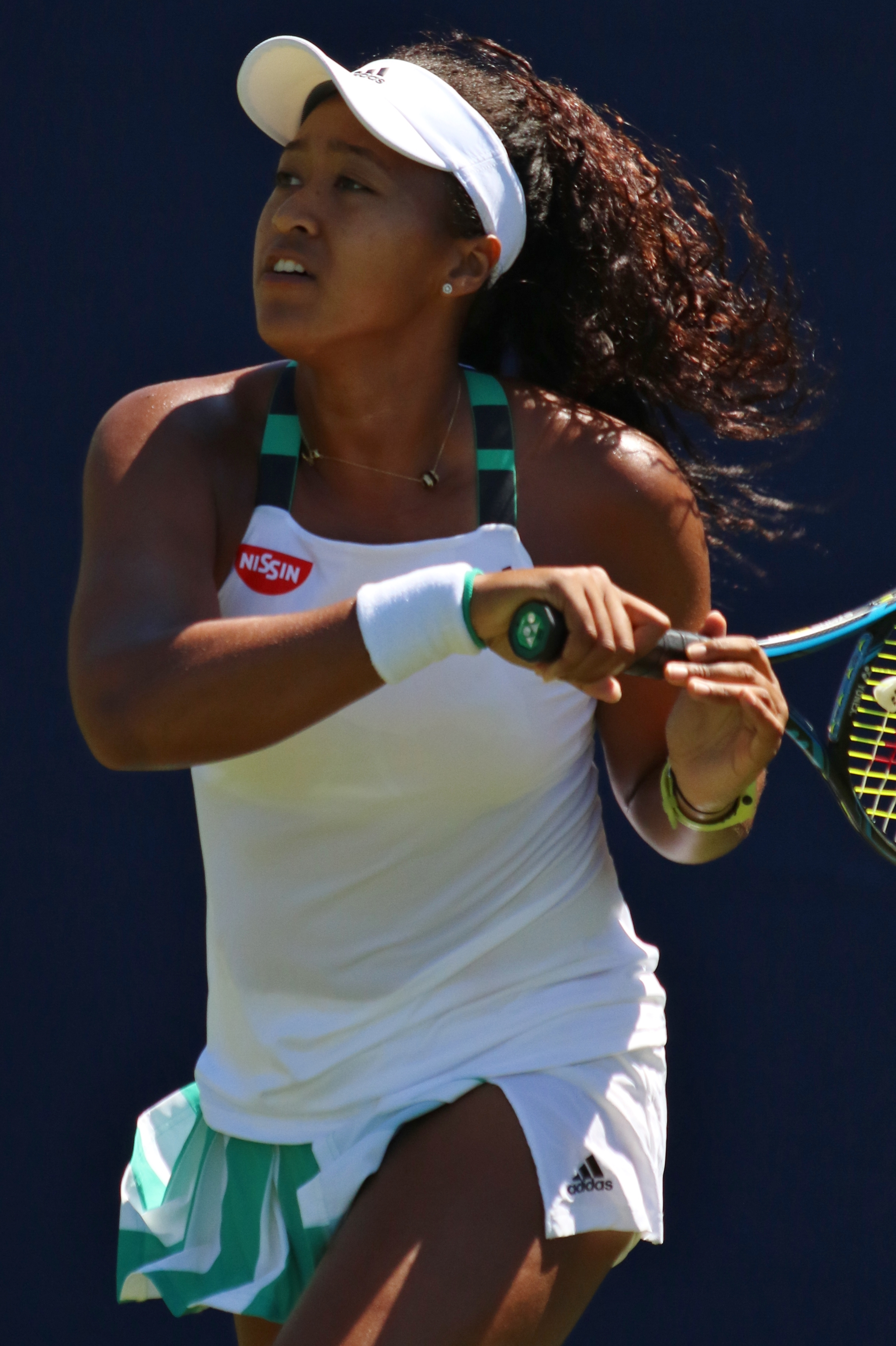 Osaka EBN17 (20)